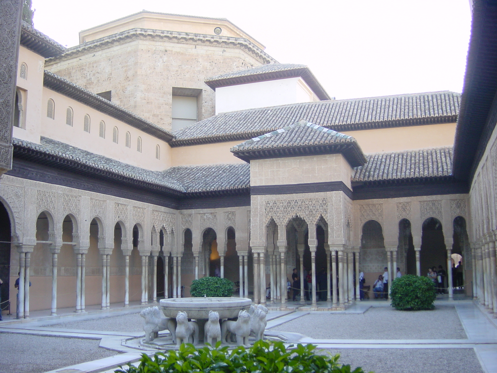 Alhambra de Granada, Patio de los Leones